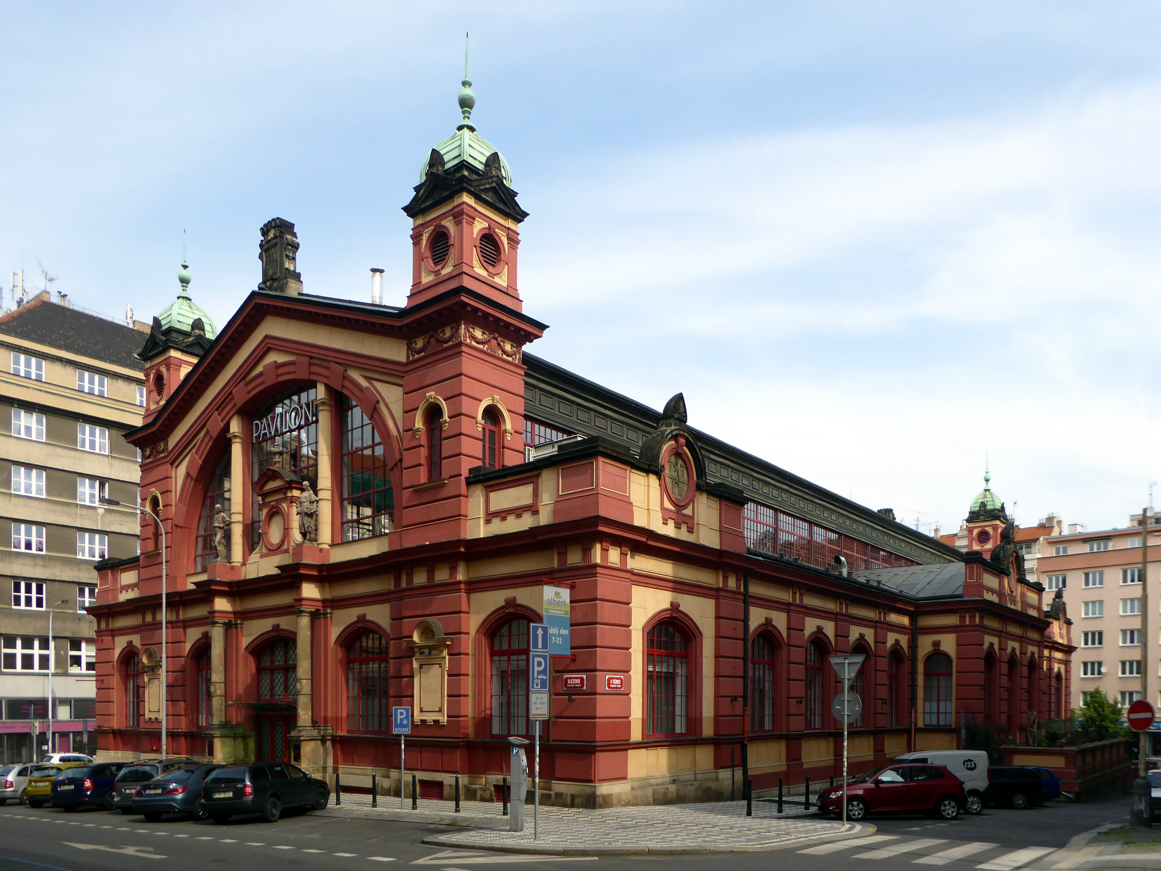 Vinohradský pavilon v Praze.